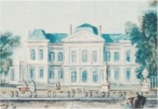 L'hôtel de Montmorency-Luxembourg à Paris, façade sur le jardin vue depuis le boulevard Montmartre. Etat postérieur aux transformations effectuées par Le Carpentier pour le second maréchal de Luxembourg.